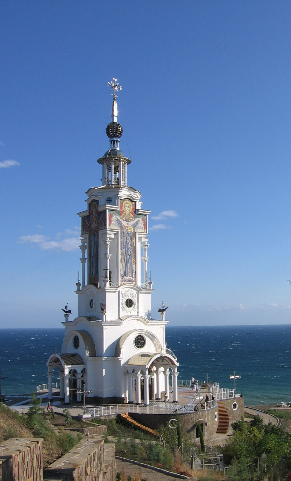 Храм-маяк Св. Николая Чудотворца, Малореченское, Крым 2